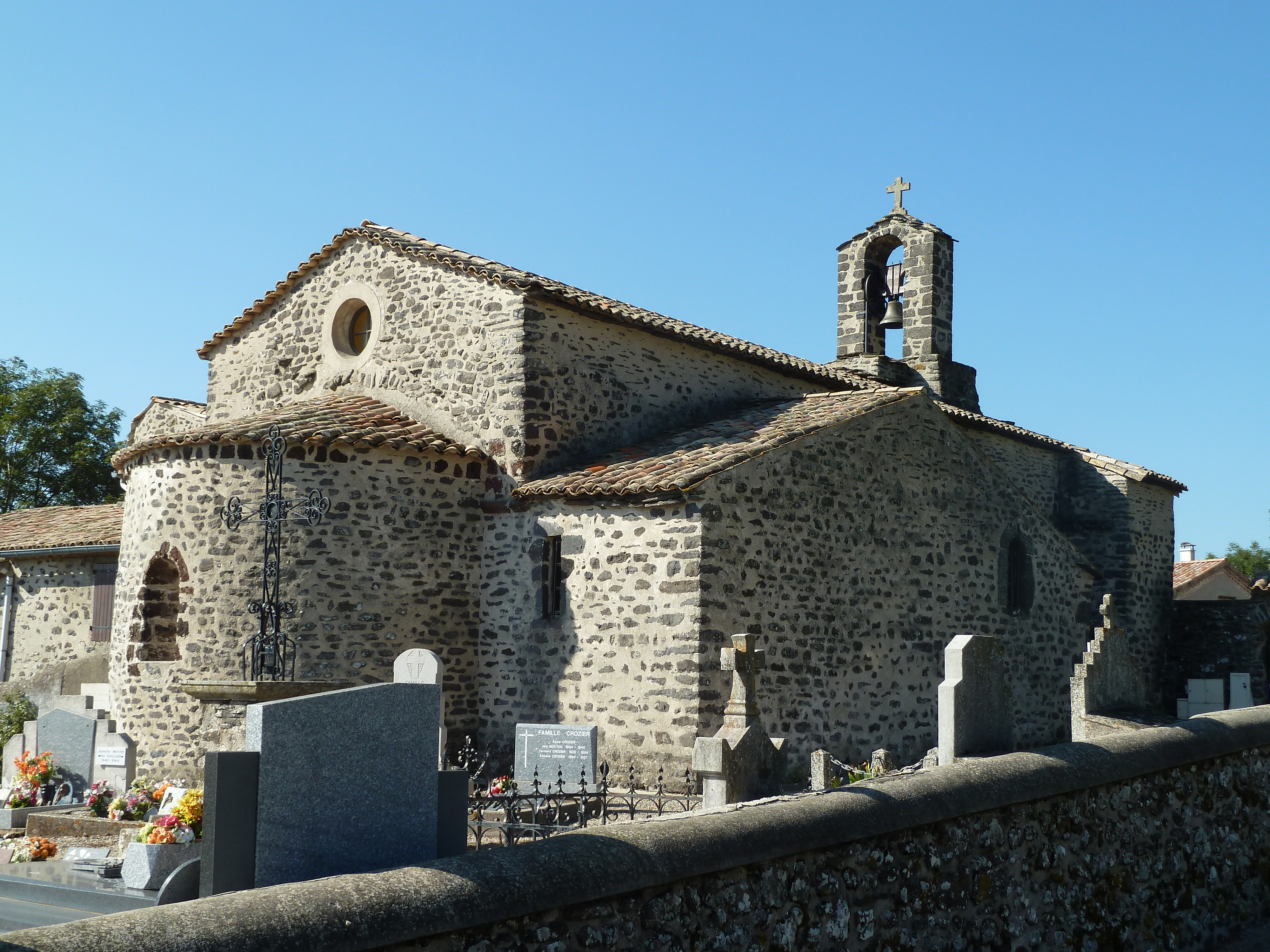 Église Saint-Genest, (Inscrit, 1974) .